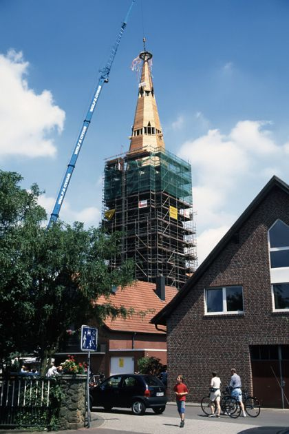 Richtfest des renovierten Kirchturms St. Silverster in Erle am 22. Juni 1998